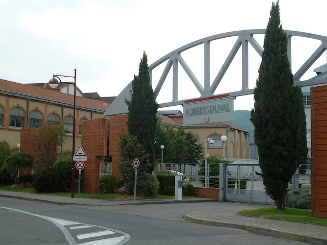 Entrée principale de l'usine sidérurgique de Pamiers